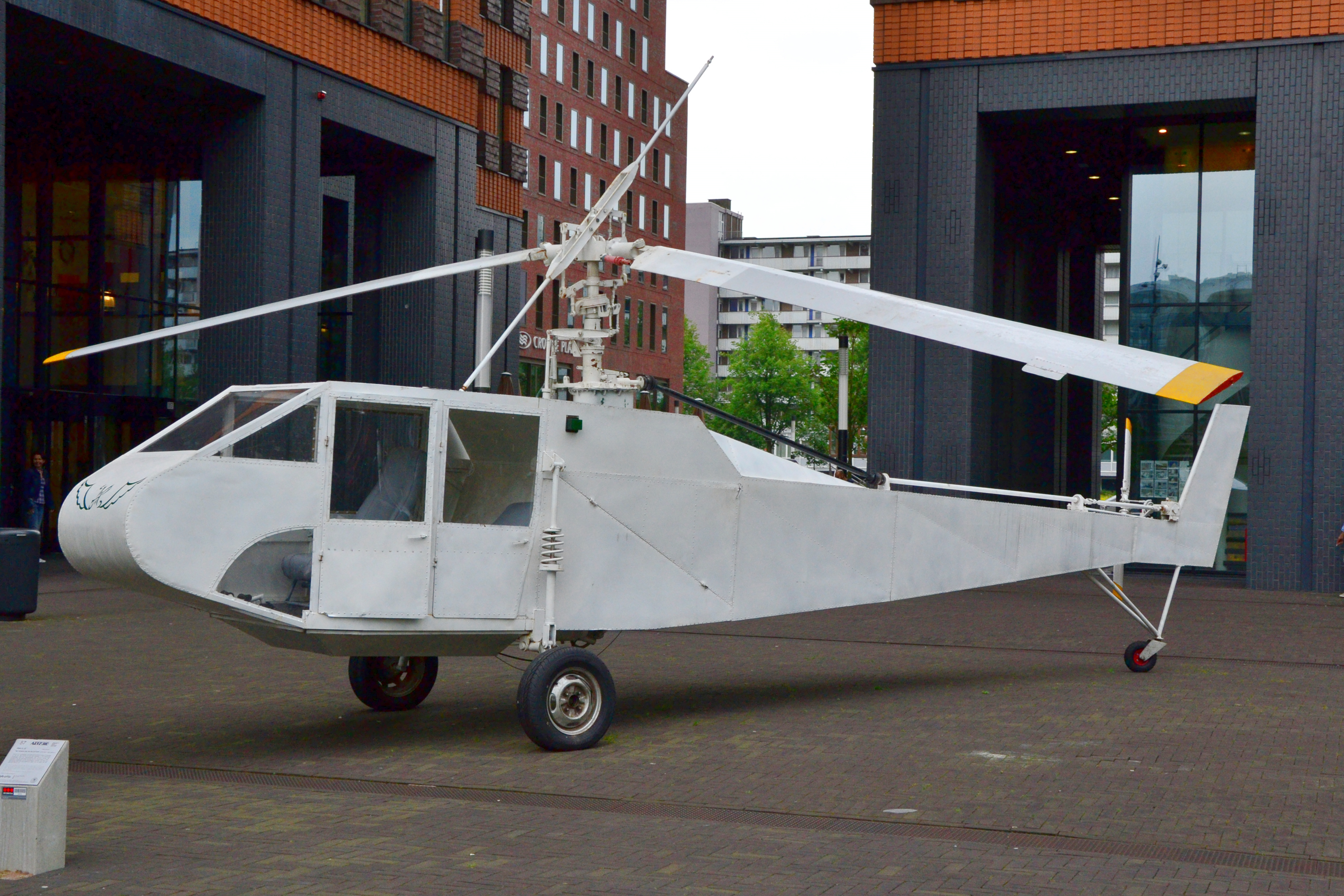 Der Hubschrauber aus der Video installation The Farmers and the Helicopters von Dinh Q. Lê aus dem Jahr 2006